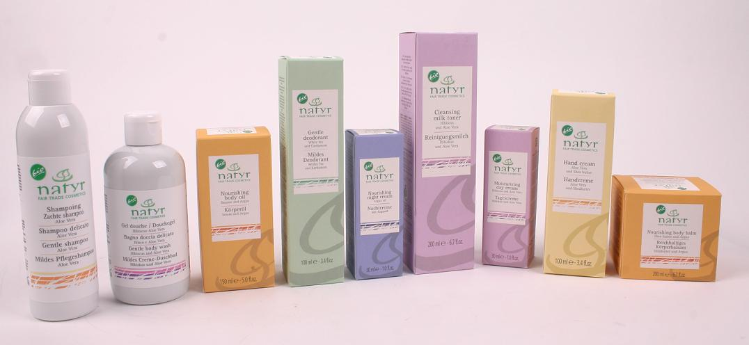 fair gehandelte Naturkosmetik aus dem Sortiment von El Puente